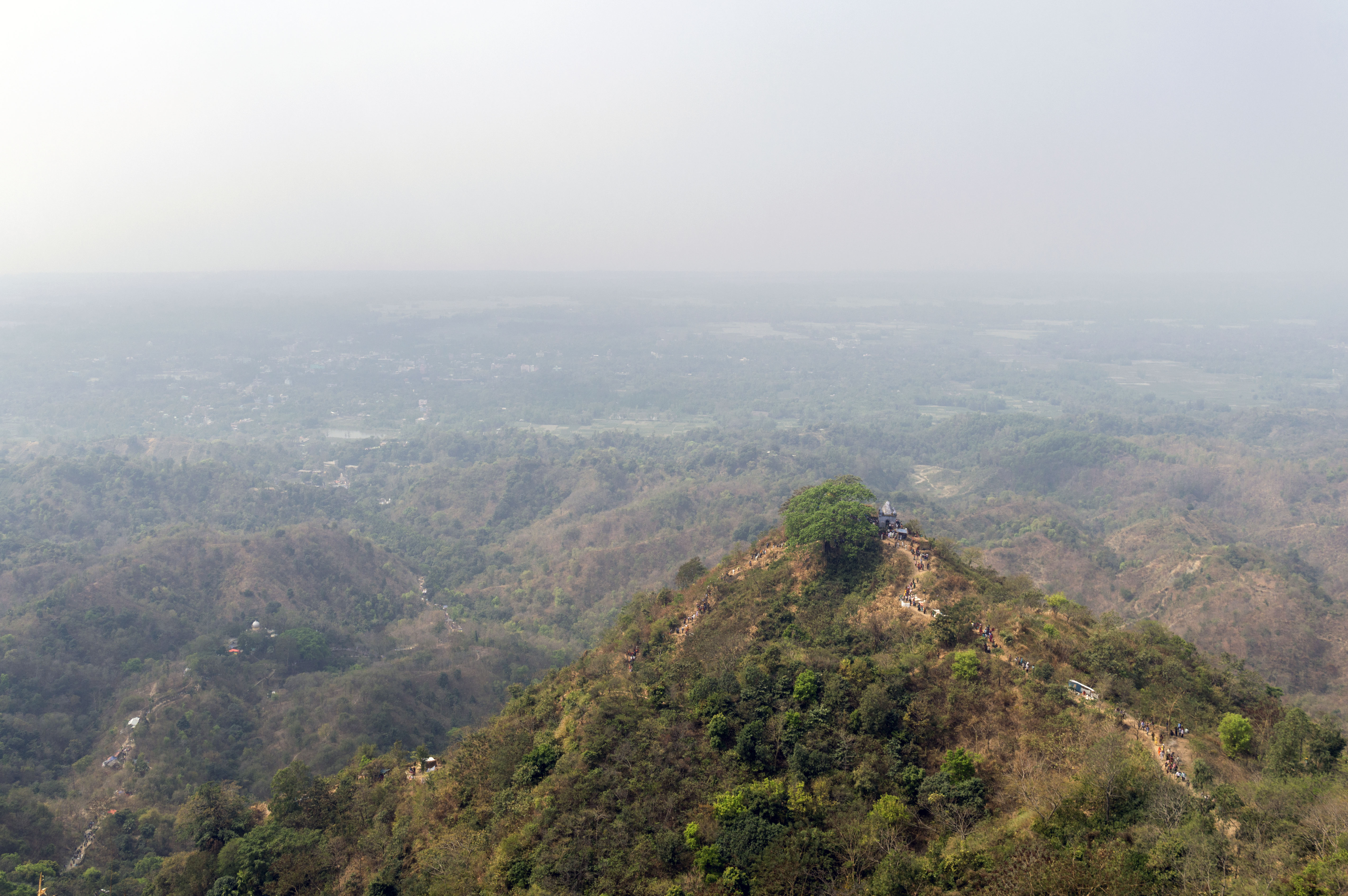 Chandranath Temple located on top of the 350 metres high Chandranath hill, is a famous Shakti Peeth located near Sitakunda in Bangladesh where, as per Hindu sacred texts, the right arm of Goddess Sati fell. Sitakunda Chandranath Temple is a holy place of pilgrimage. There are two idols here, one is of Devi Sati and called as Bhavani. The other idol in this temple is of Lord Shiva Known as the Chandrashekhar. This particular word is depicted for all those individuals who have got a moon at the crown or at the top of their head. As per the belief of many local people, Lord Shiva himself has committed to visit Chandrasekhar Mountain during Kali Yuga. The temple is beautifully made with marble structures and art. The name, Shakti peeth chattal is related to the location of its establishment. A famous town in Bangladesh, Chatgaon is the establishment point of Shakti peeth chattal. This town is also known as chitagaon by the local people in the particular district. Every year lakhs of devotees visit the Chandranath Temple to take part in the Shiva Chaturdashi Puja. The temple commands a panoramic view and its surroundings are enchanting. The temple’s ancient chariot is well known for its wood carvings.